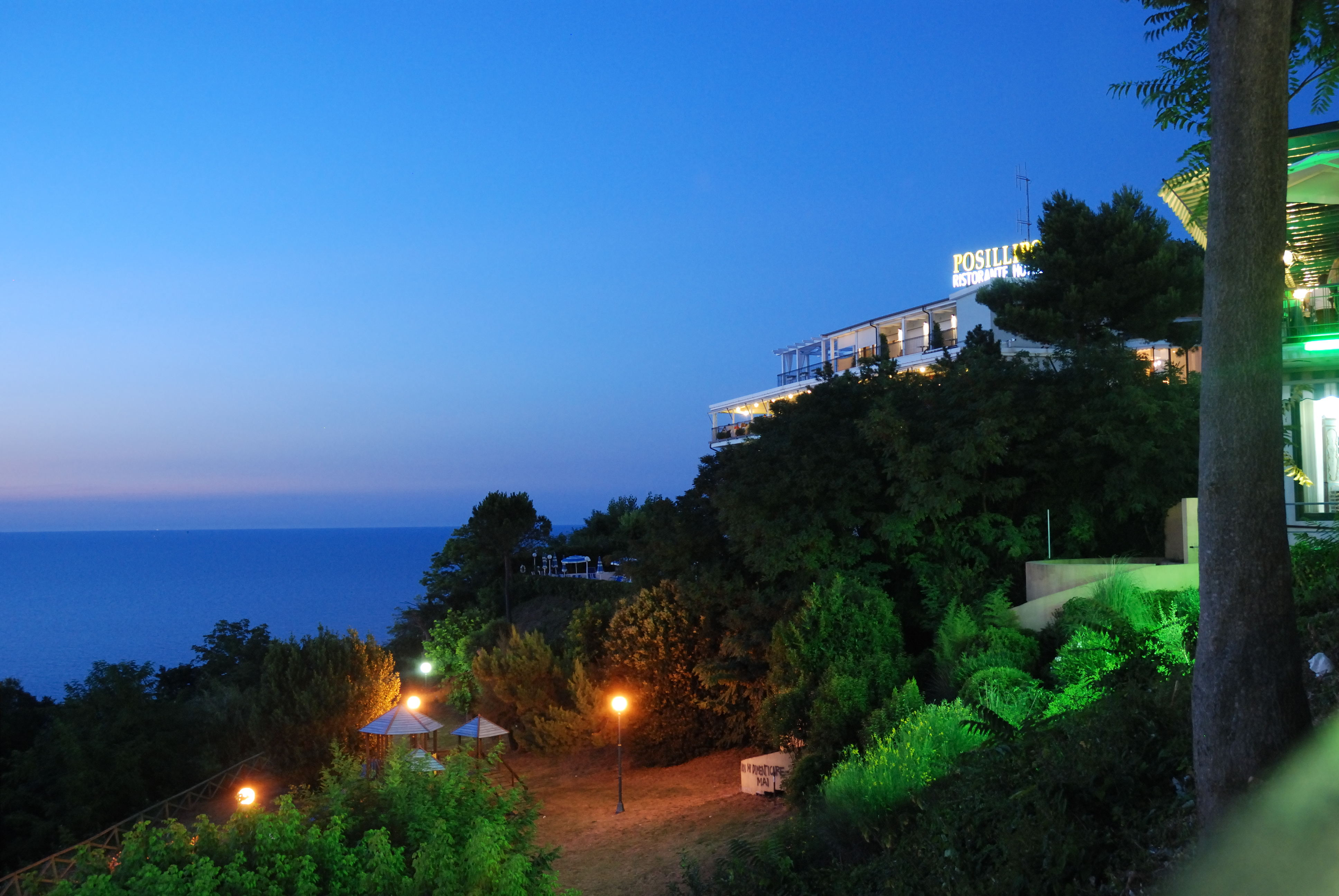 Vista da Gabicce Monte, provincia di Pesaro e Urbino, Italia.